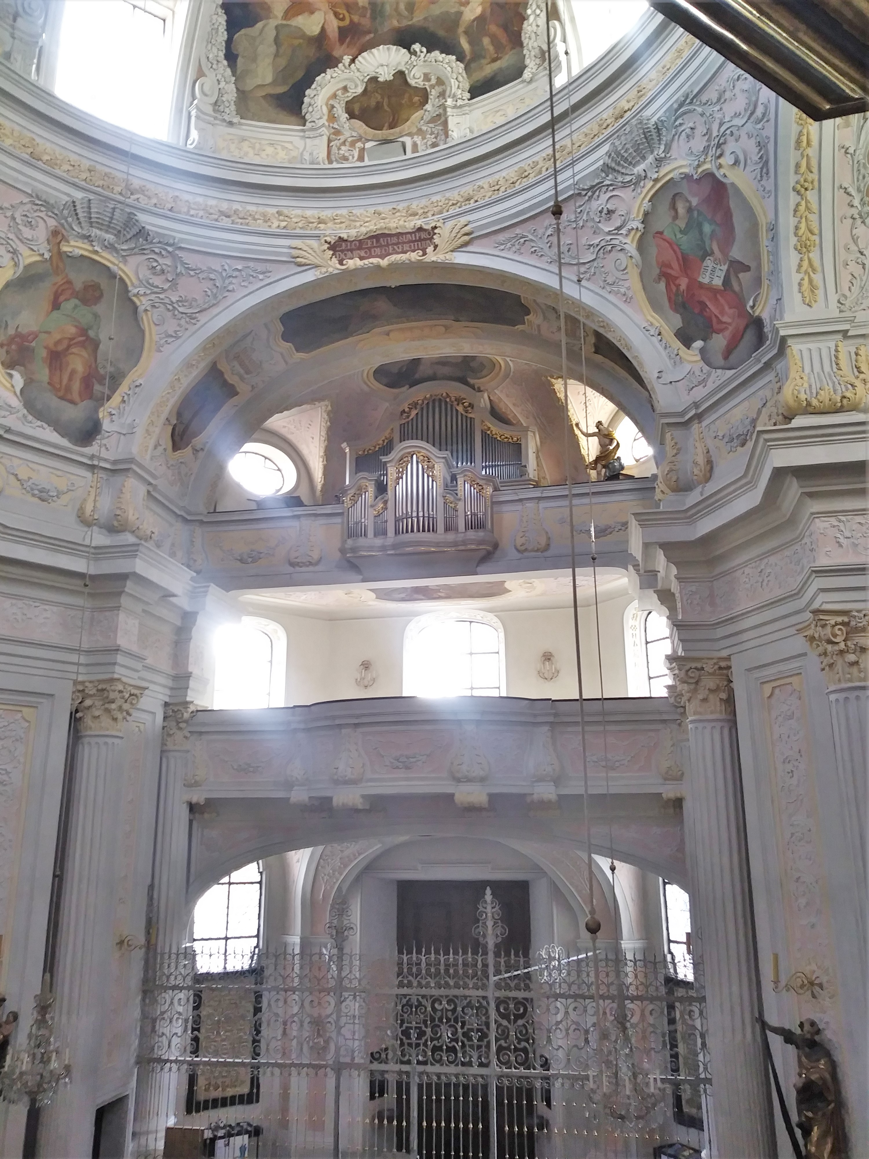 Winterhalter-Orgel der Dreifaltigkeitskirche München